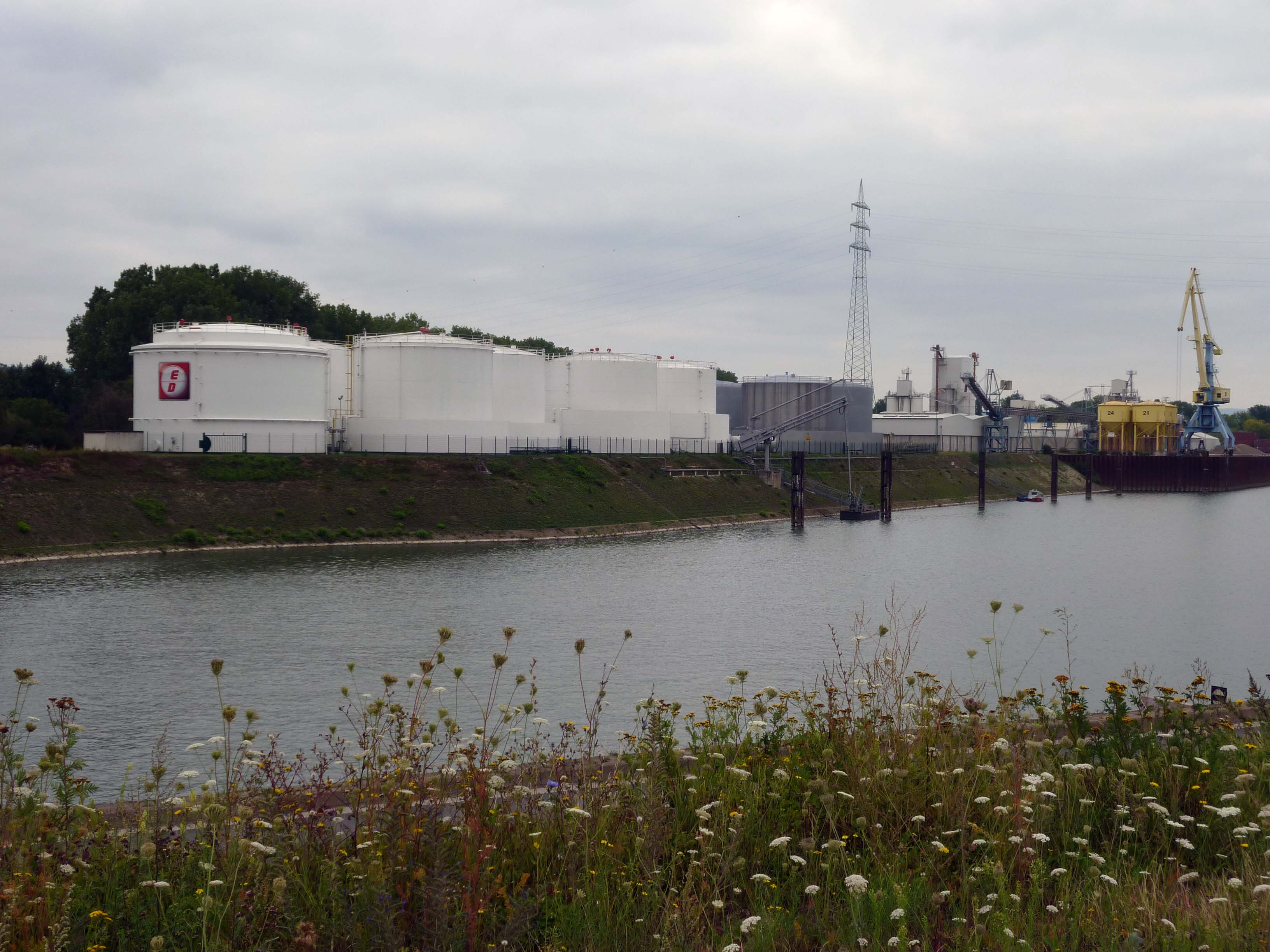 Tanklager Andernacher Hafen